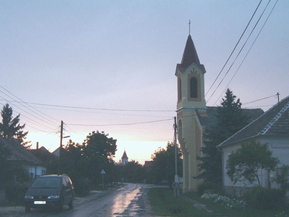 Pápadereske, Hungary. Rózsafüzér Királynője római katolikus templom